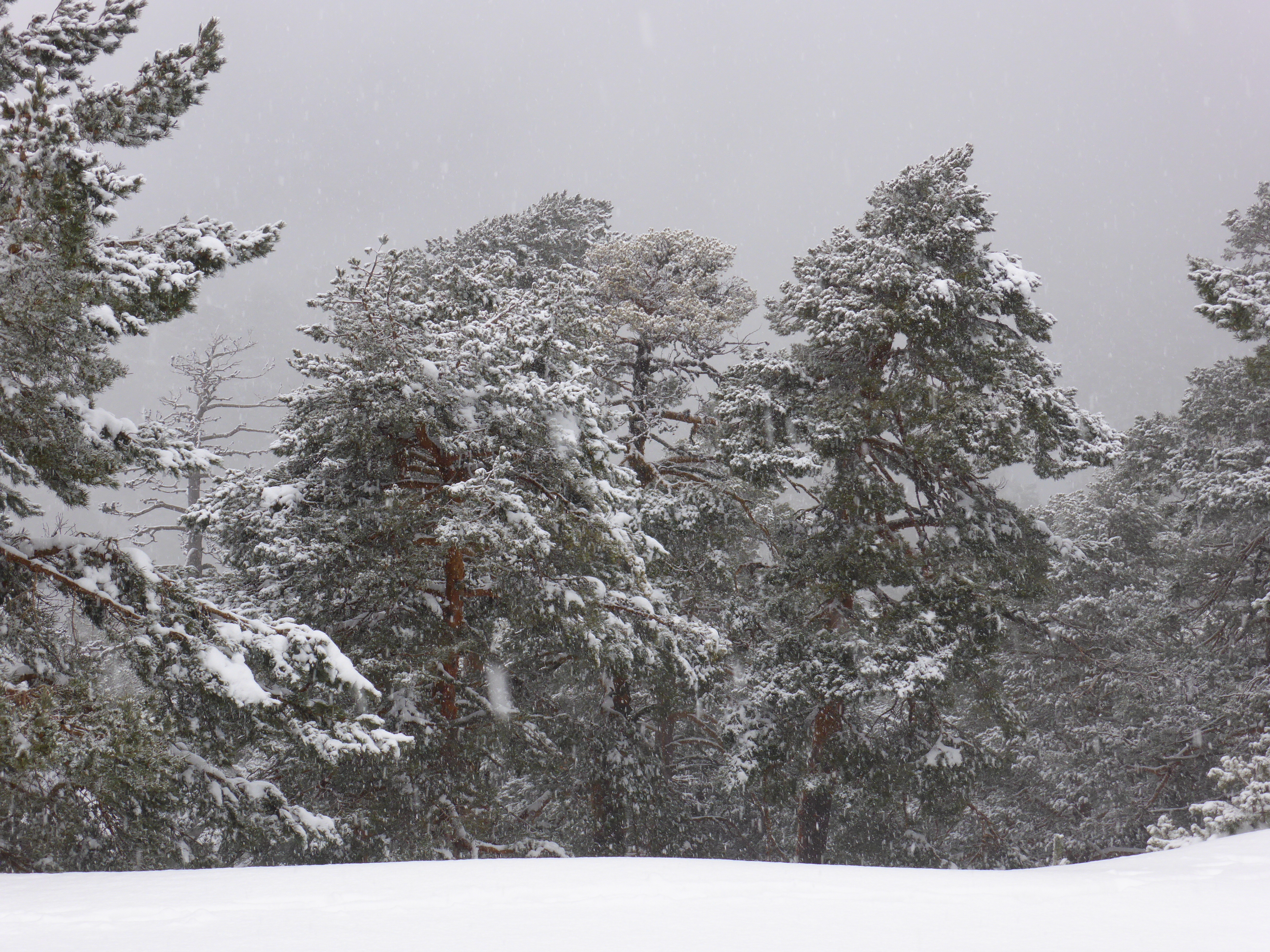 Pinus sylvestris (pino silvestre, pino de Valsaín, pino rojo o pino bermejo). Nevada cerca de la estación de Cotos, de la Línea C-9 (Cercanías Madrid).